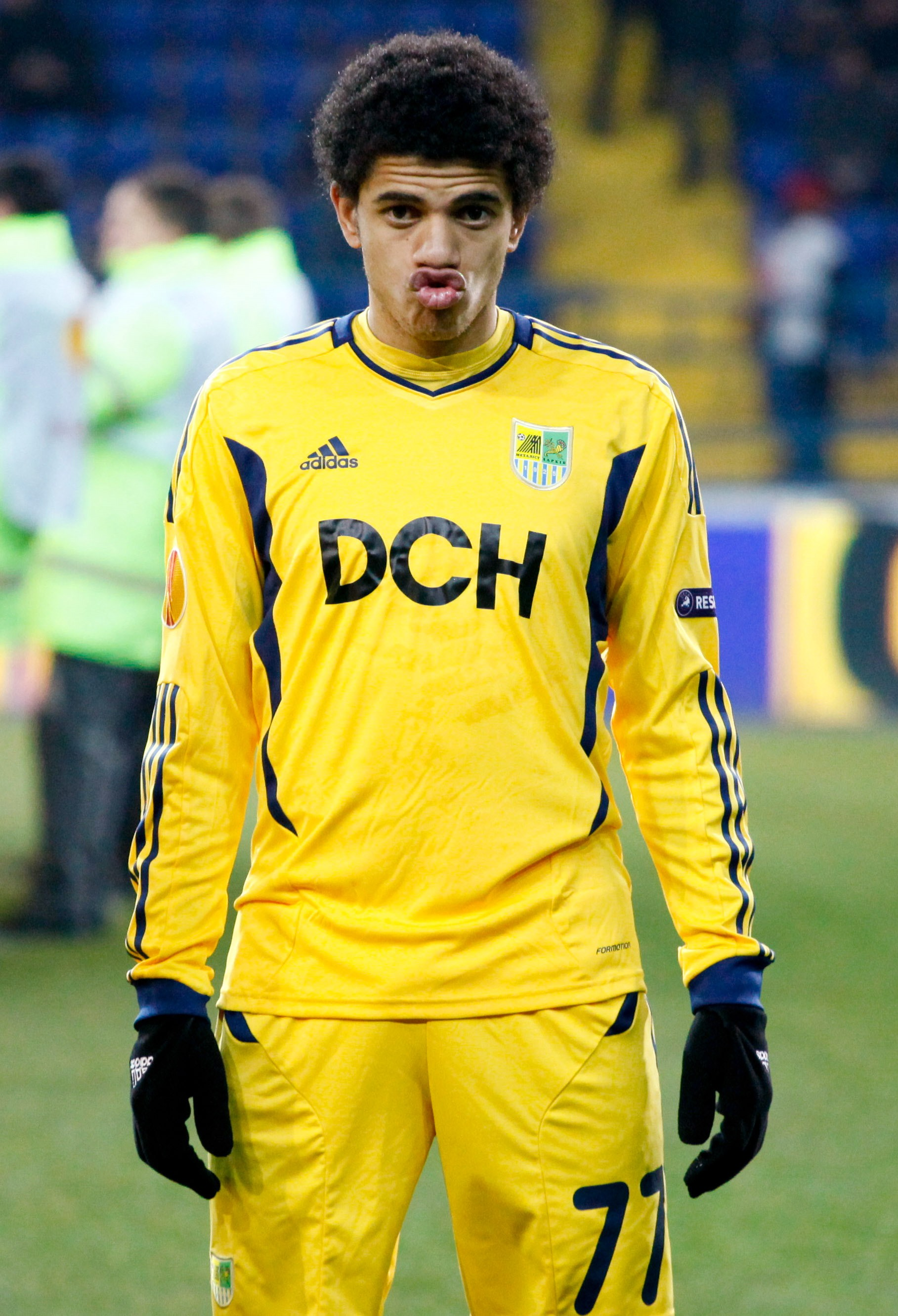 Taison Barcellos Freda